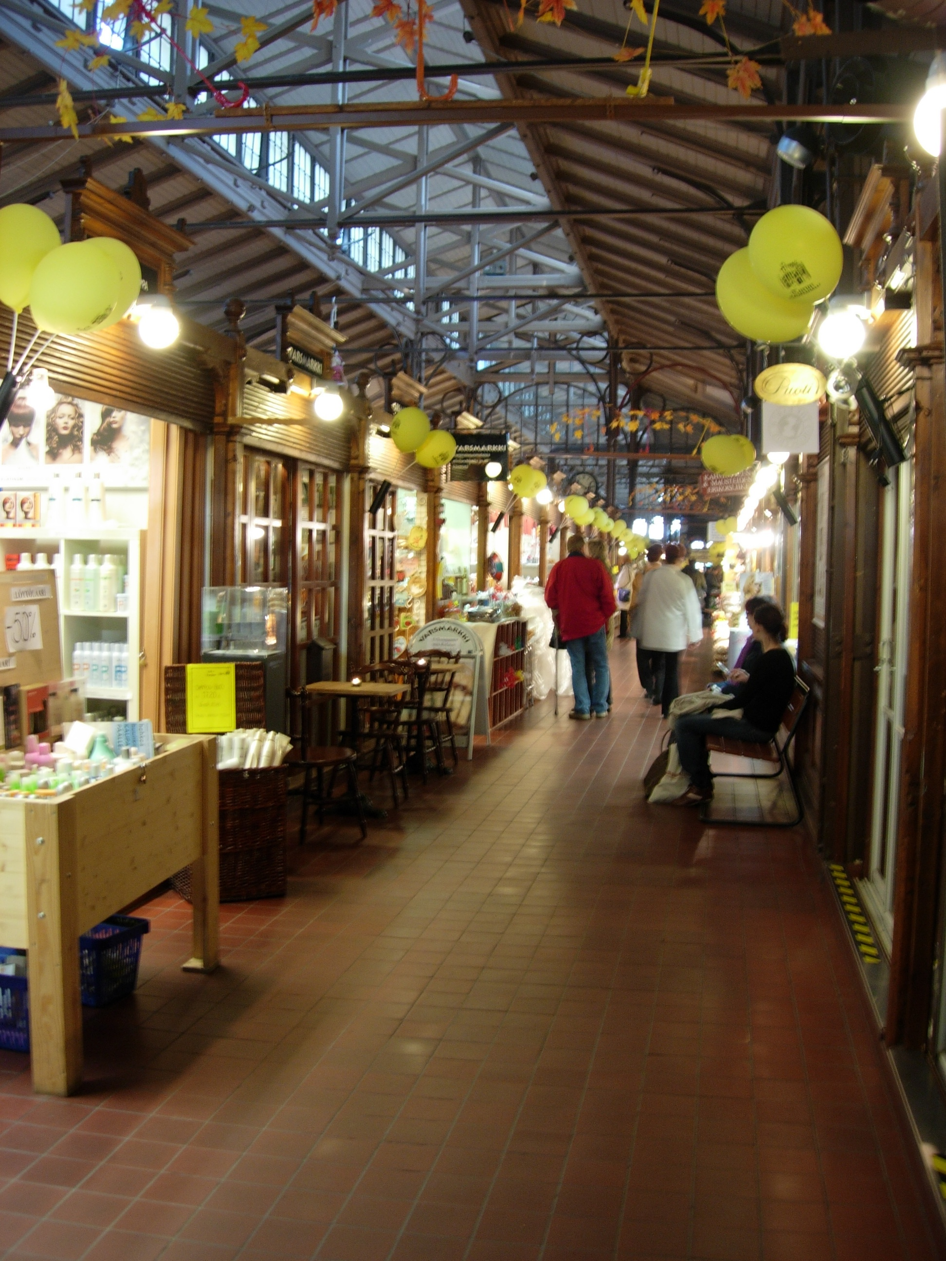 Turun kauppahallin idänpuoleinen käytävä